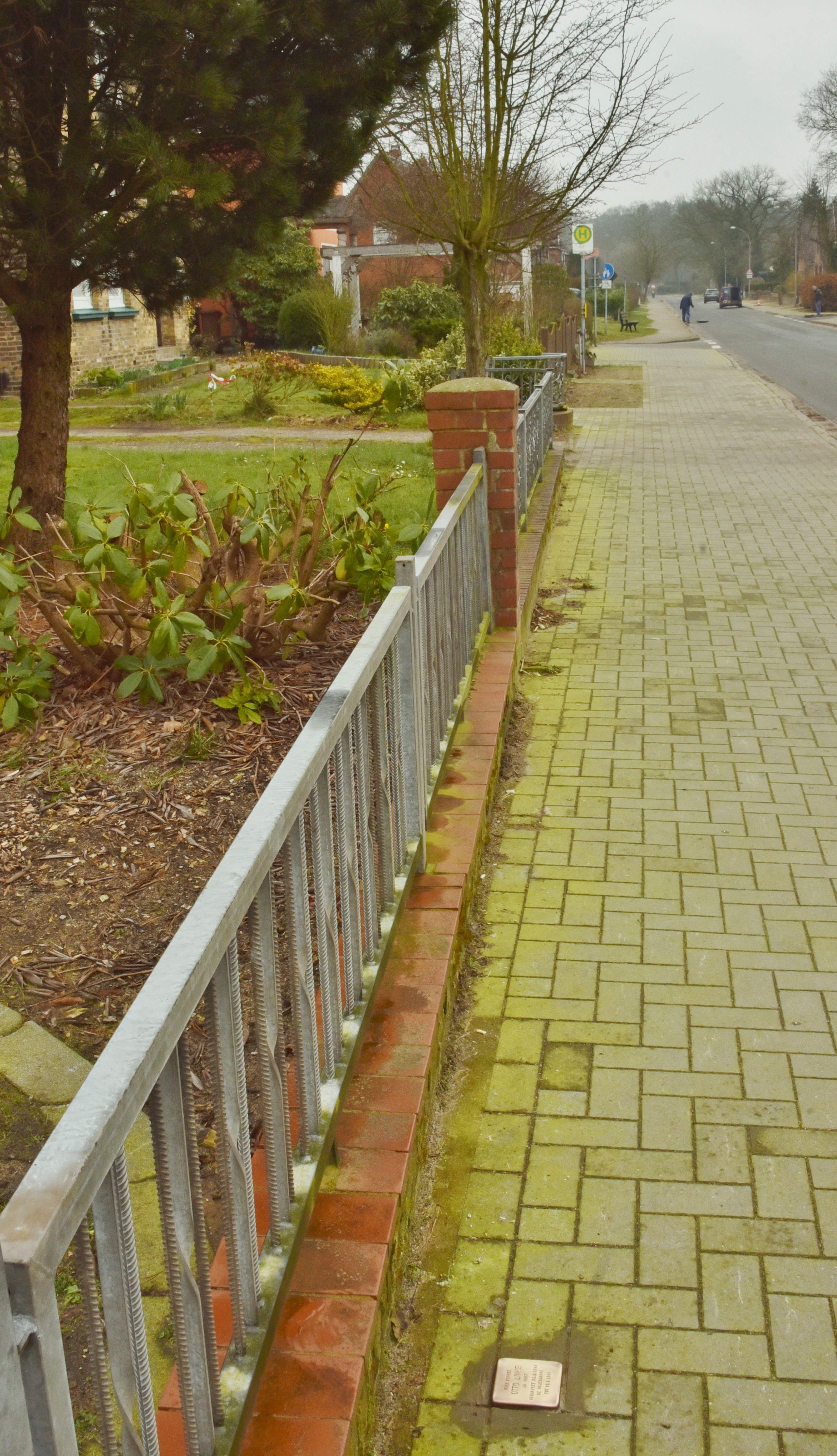 Stolperstein in Kellinghusen